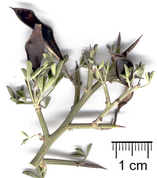 Calicotome spinosa Detail